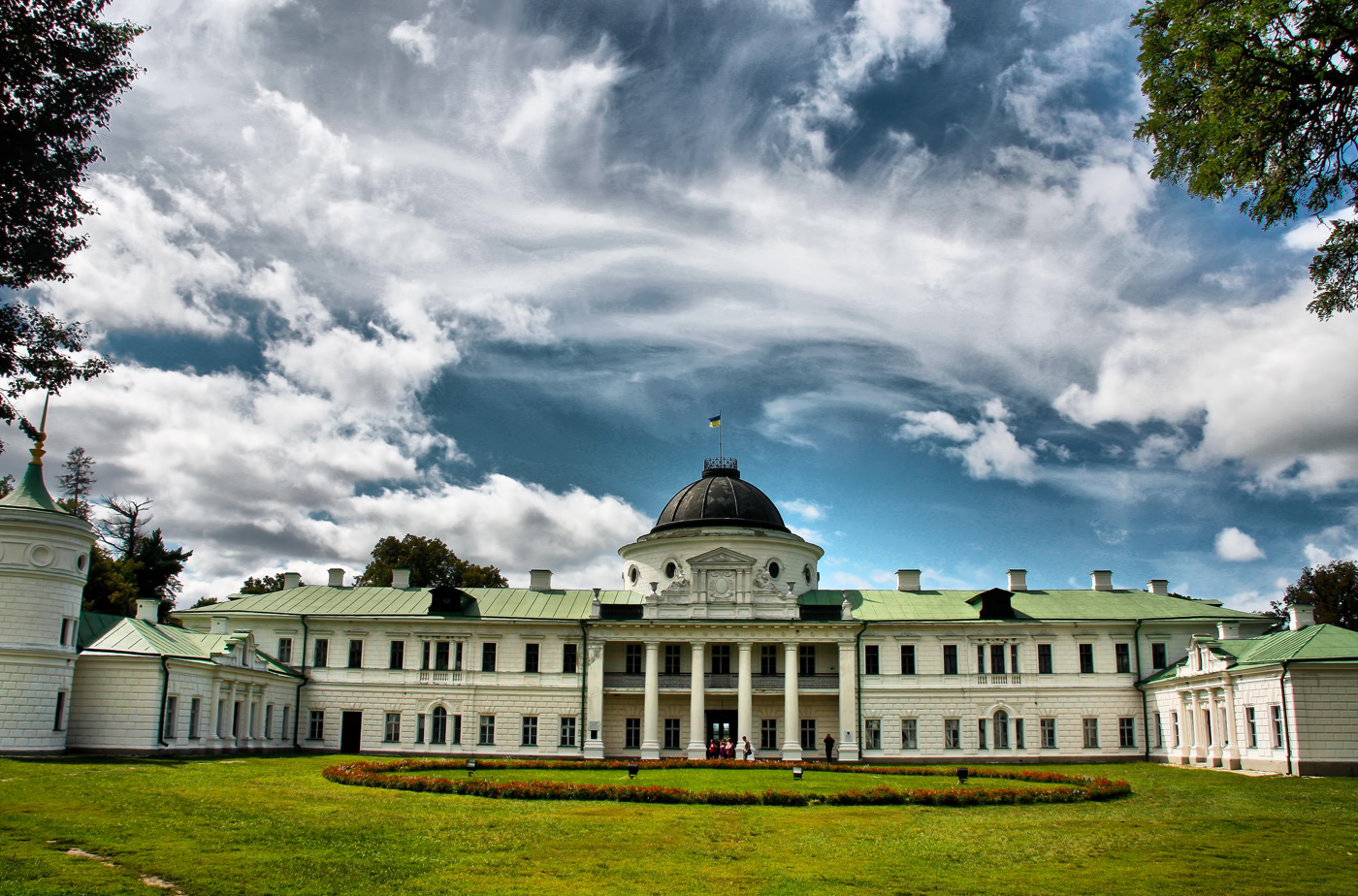 Палац (мур.), Качанівка